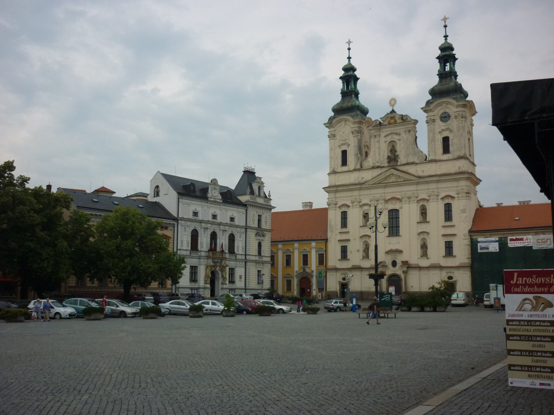 Uherské Hradiště a výlet po Baťově kanále